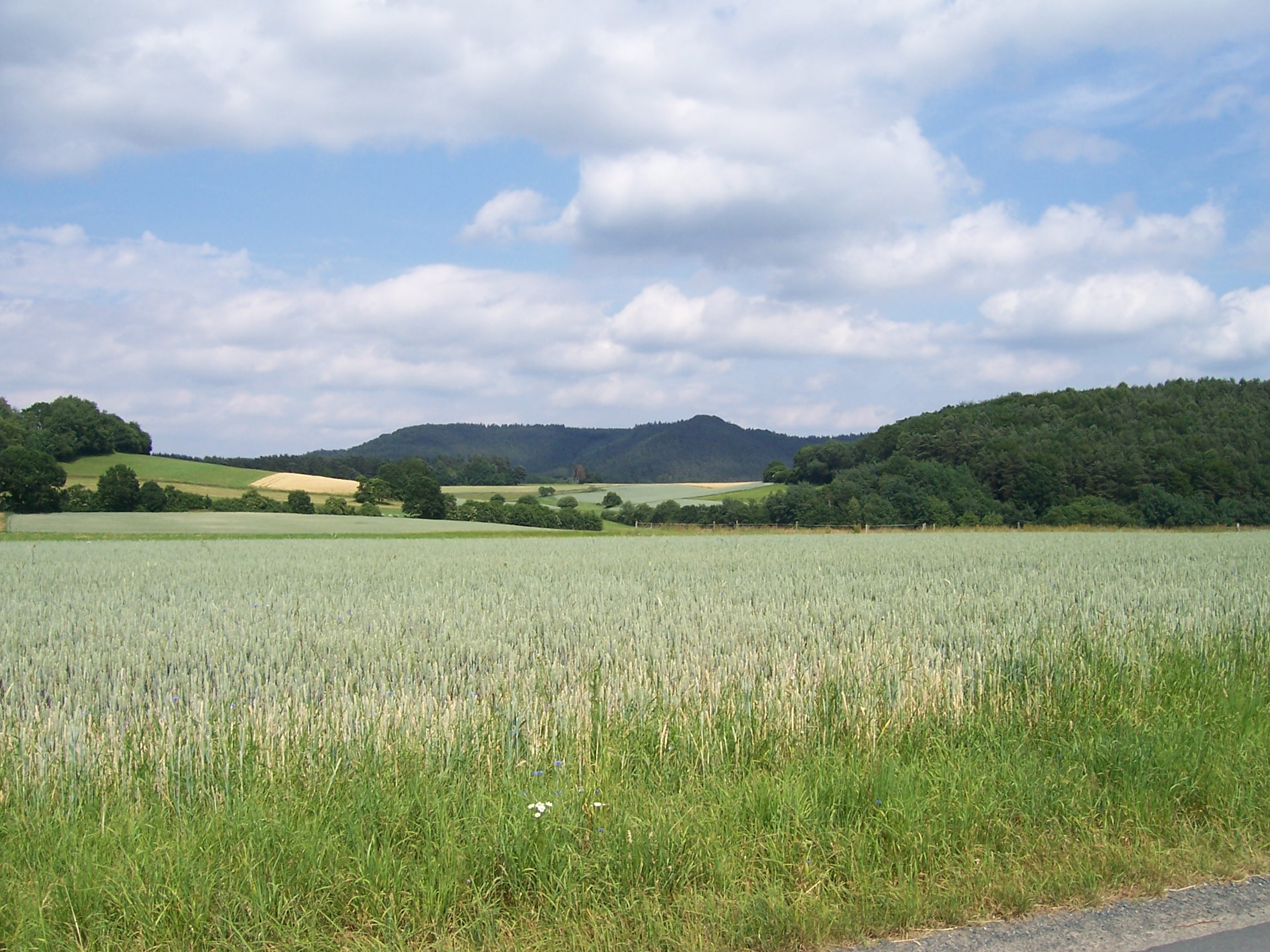 Burgwald bei Oberrosphe, Treppenkopf und Tauschenberg